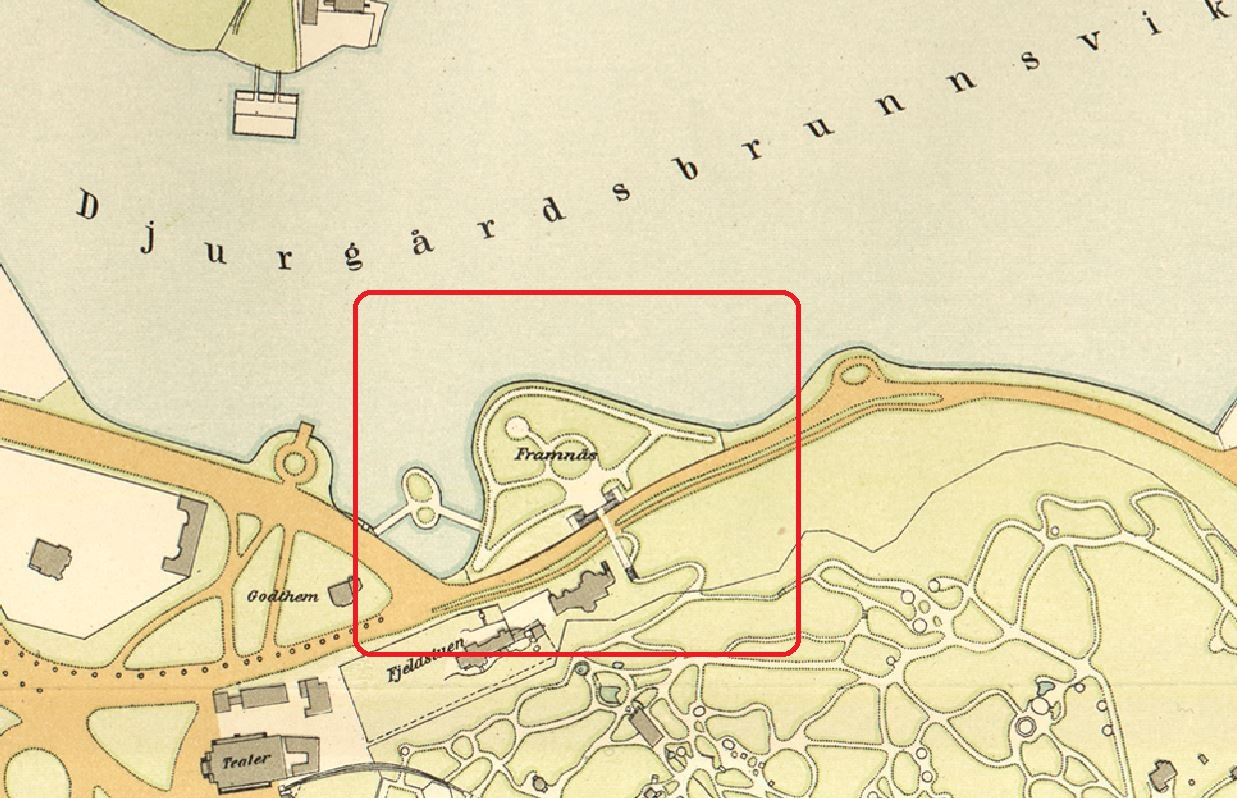 Generalstabens Litografiska Anstalt, 1899 års karta över Stockholm visande platsen för "Gamla Stockholm 1897"